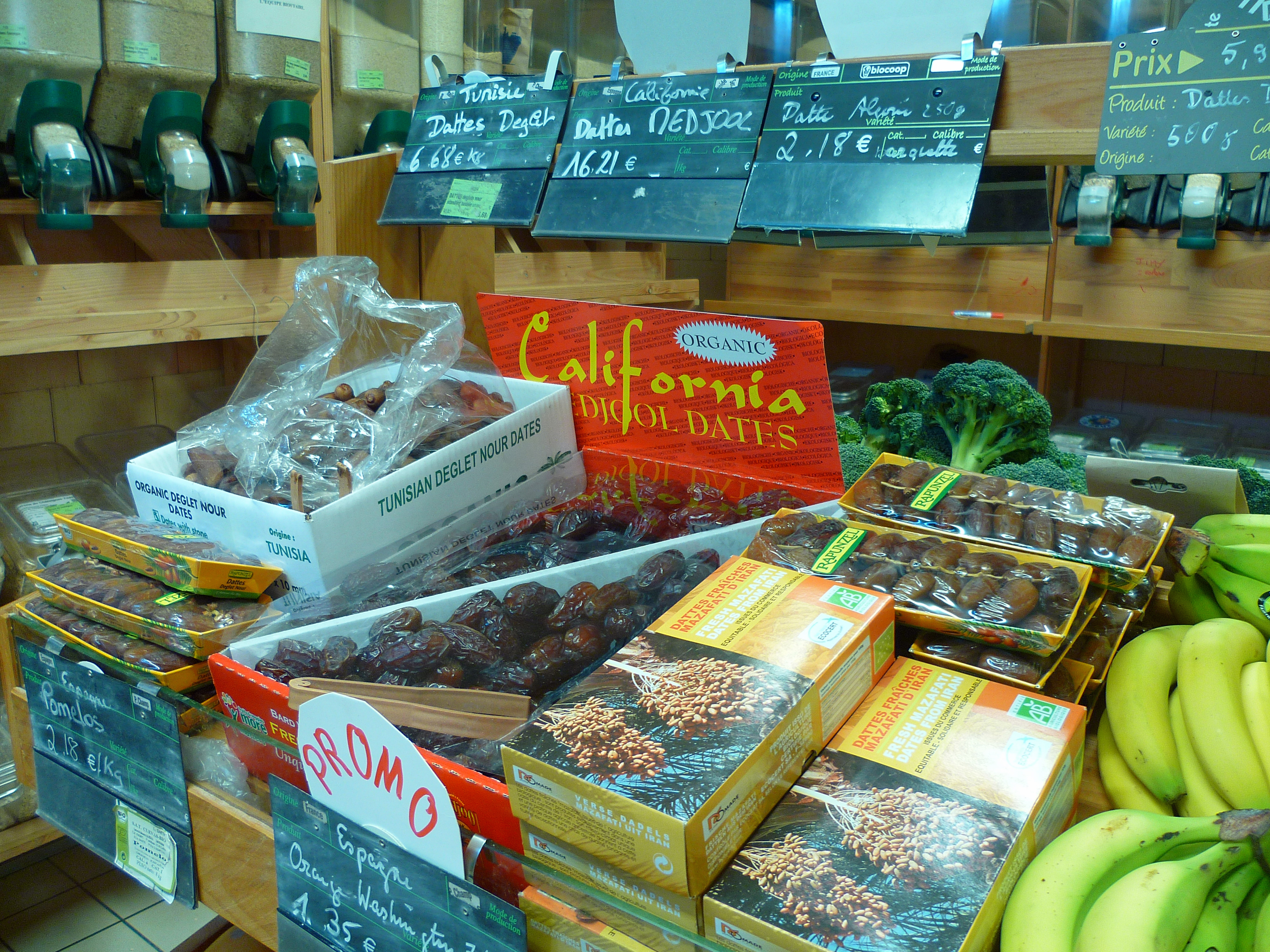 Saint-Girons (Ariège, France) : Le rayon dattes de la Biocoop : Deglet nour de Tunisie, Medjool de Californie, Mazafati d'Iran.